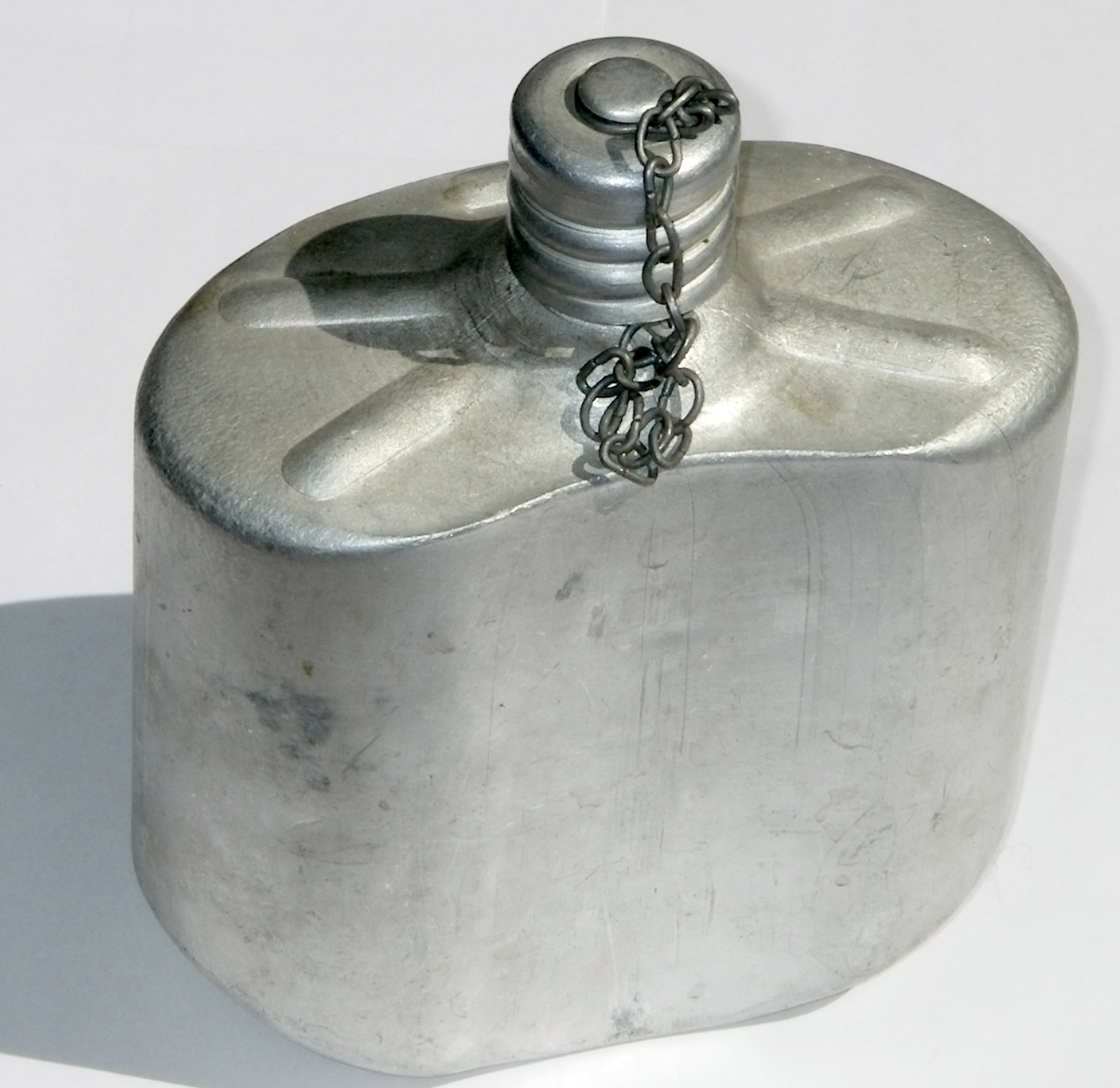 Aluminnium flask